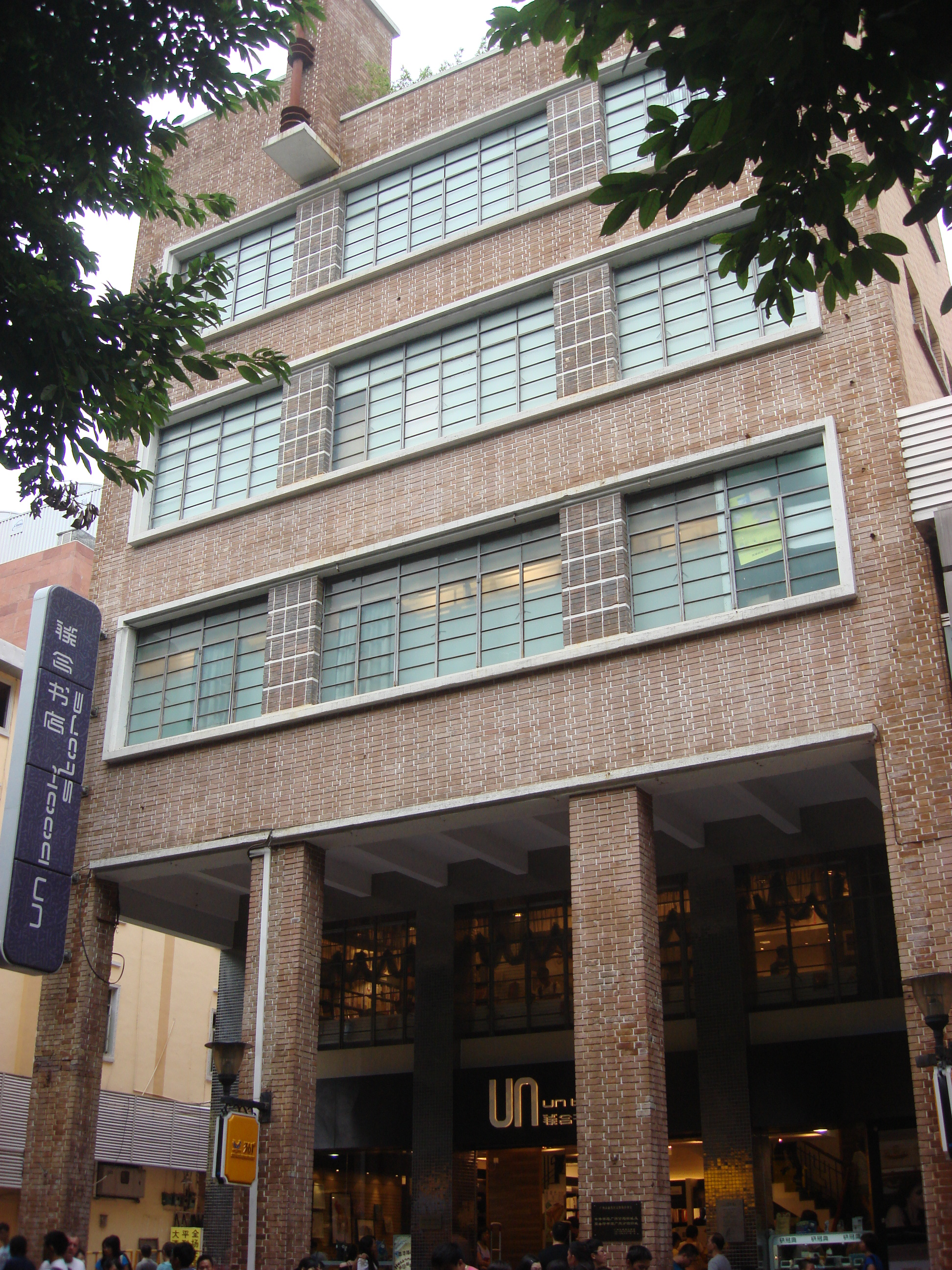 廣州聯合書店，位於原中華書局廣州分局舊址。